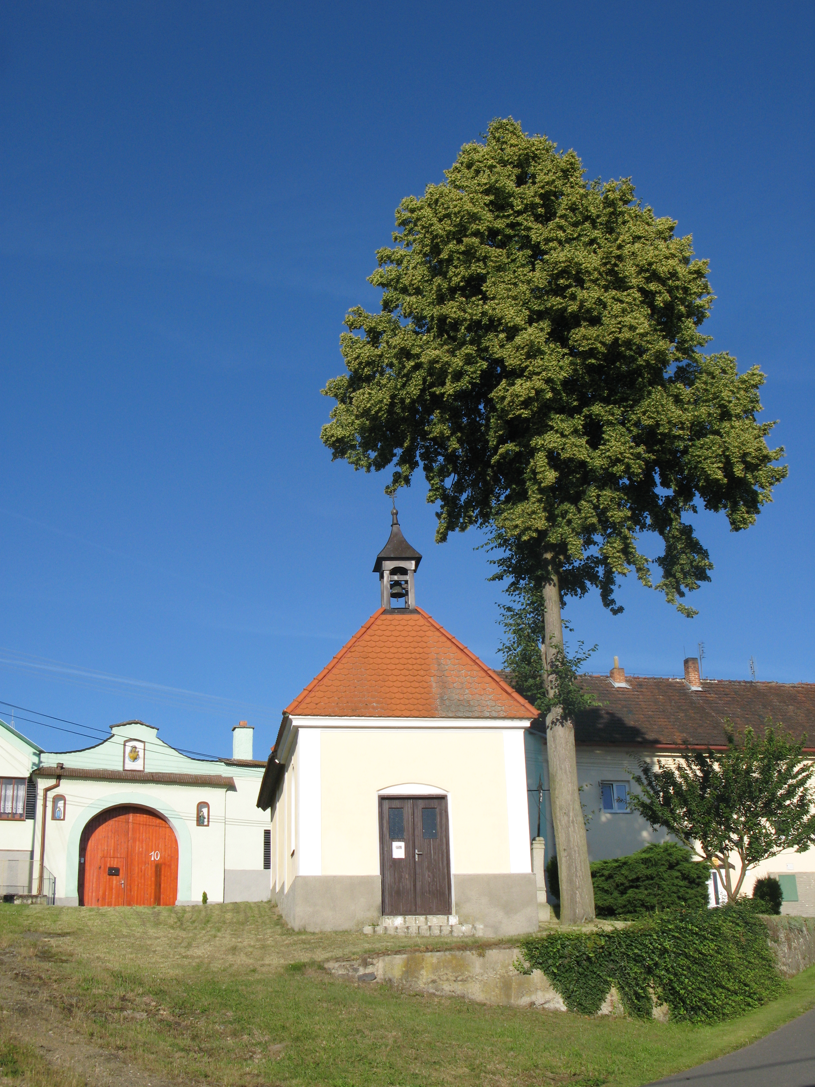 Kaple v obci Louňová.